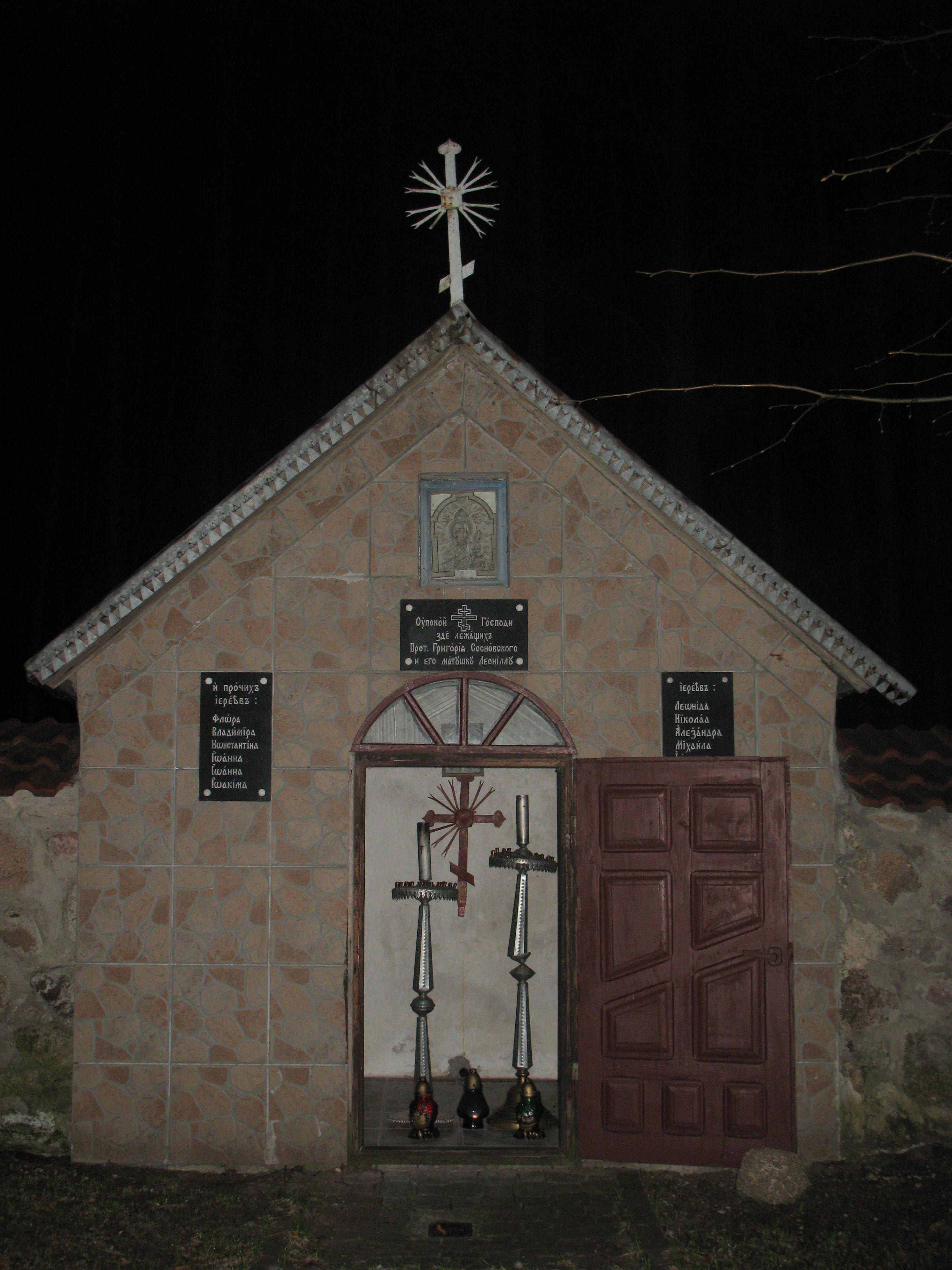 Grobowiec ks. Grzegorza Sosnowskiego w ogrodzeniu cerkiewnym w Puchłach.